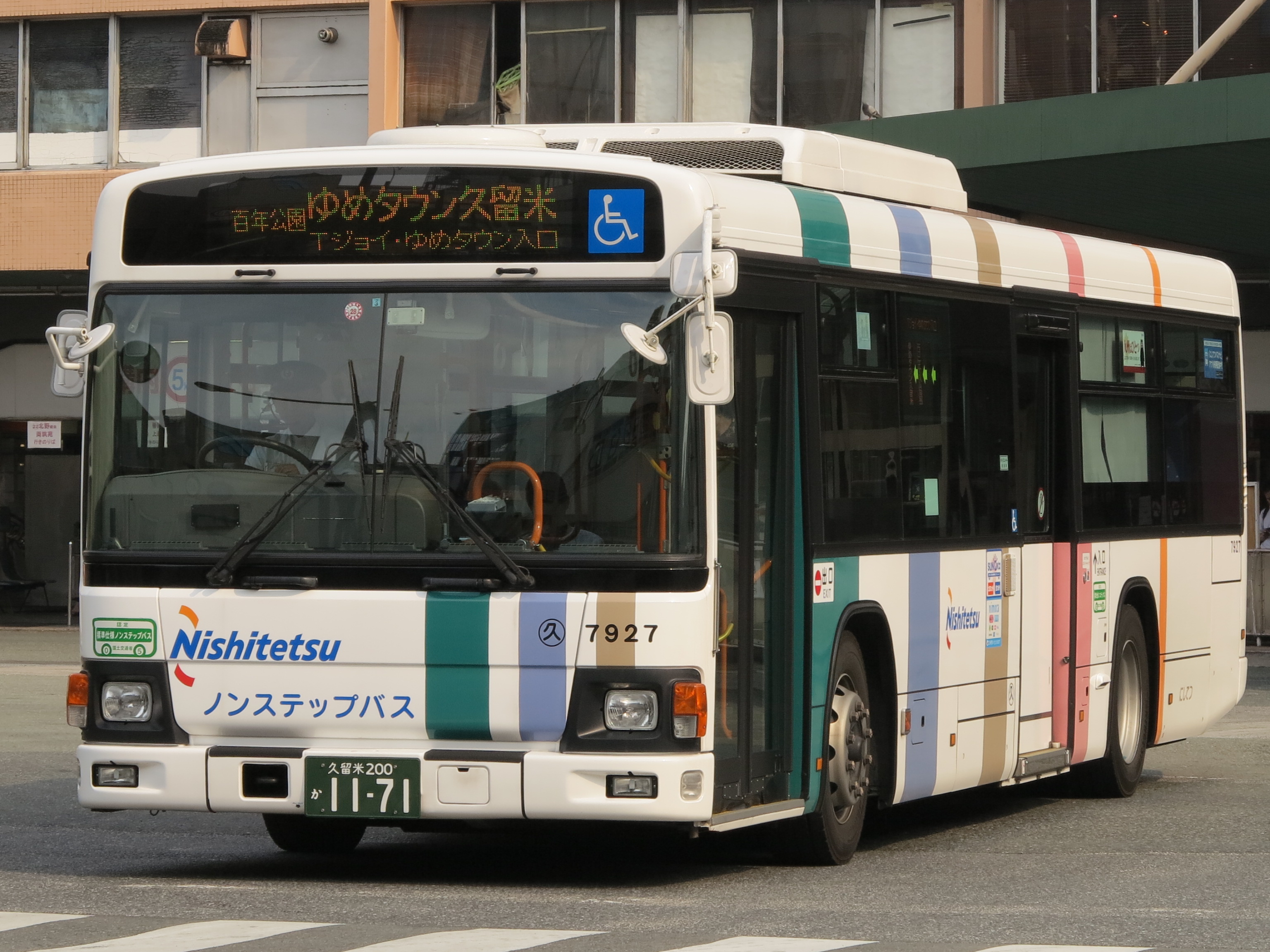 西鉄久留米にて撮影、西鉄バス久留米の日野・ブルーリボンII（7927号車）